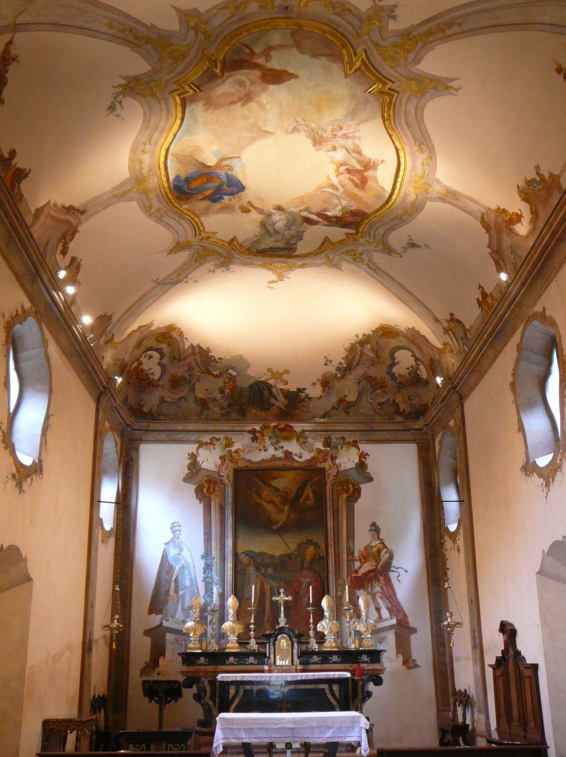 Chiesa di San Gregorio Magno in Camposanto This is a photo of a monument which is part of cultural heritage of Italy.